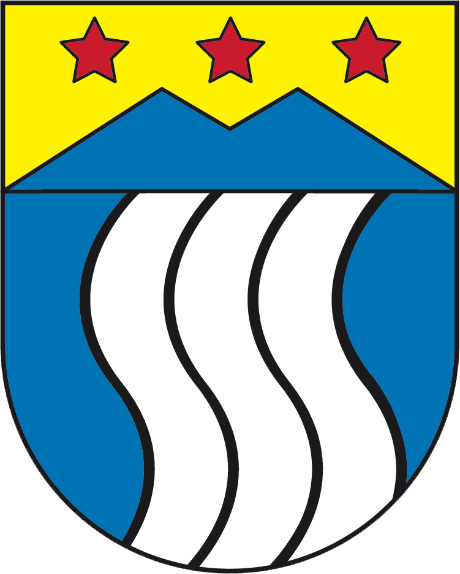 Wappen von Riederalp Kanton Wallis Schweiz, homologiertes Wappen der drei vorher selbstständigen Gemeinden